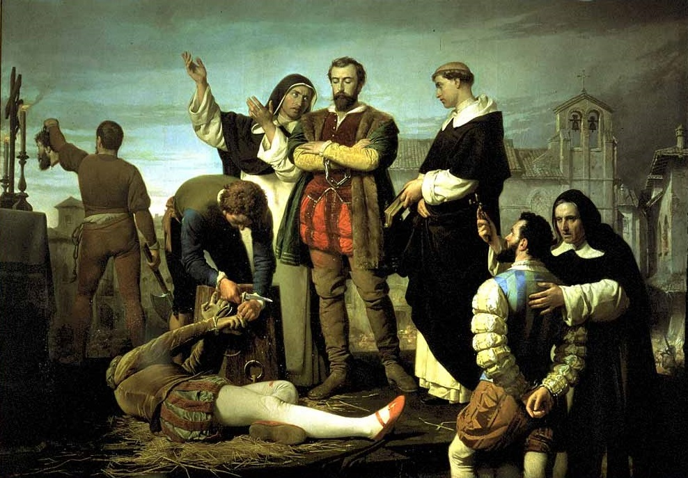 Esta obra representa la ejecución de los comuneros Juan de Padilla, Juan Bravo y Francisco Maldonado, que se llevó a cabo en Villalar el día 24 de abril de 1521, y fue adquirida por el Estado español por la cantidad de 80.000 reales, y actualmente se expone en el Congreso de los Diputados de España.